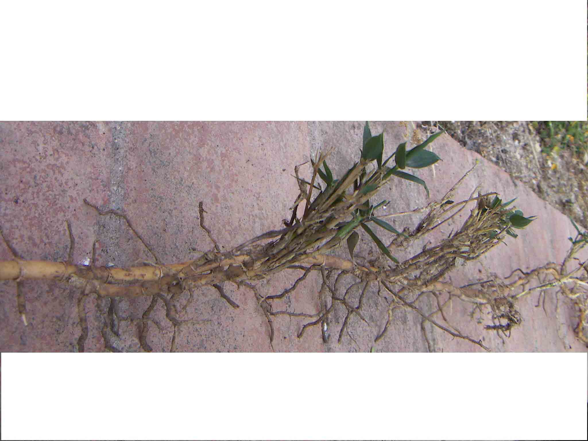 Rizama de Phillostachys distichus (Bambú nan) Soc l'autor Jordi coll costa 14:02, 5 February 2007 (UTC)